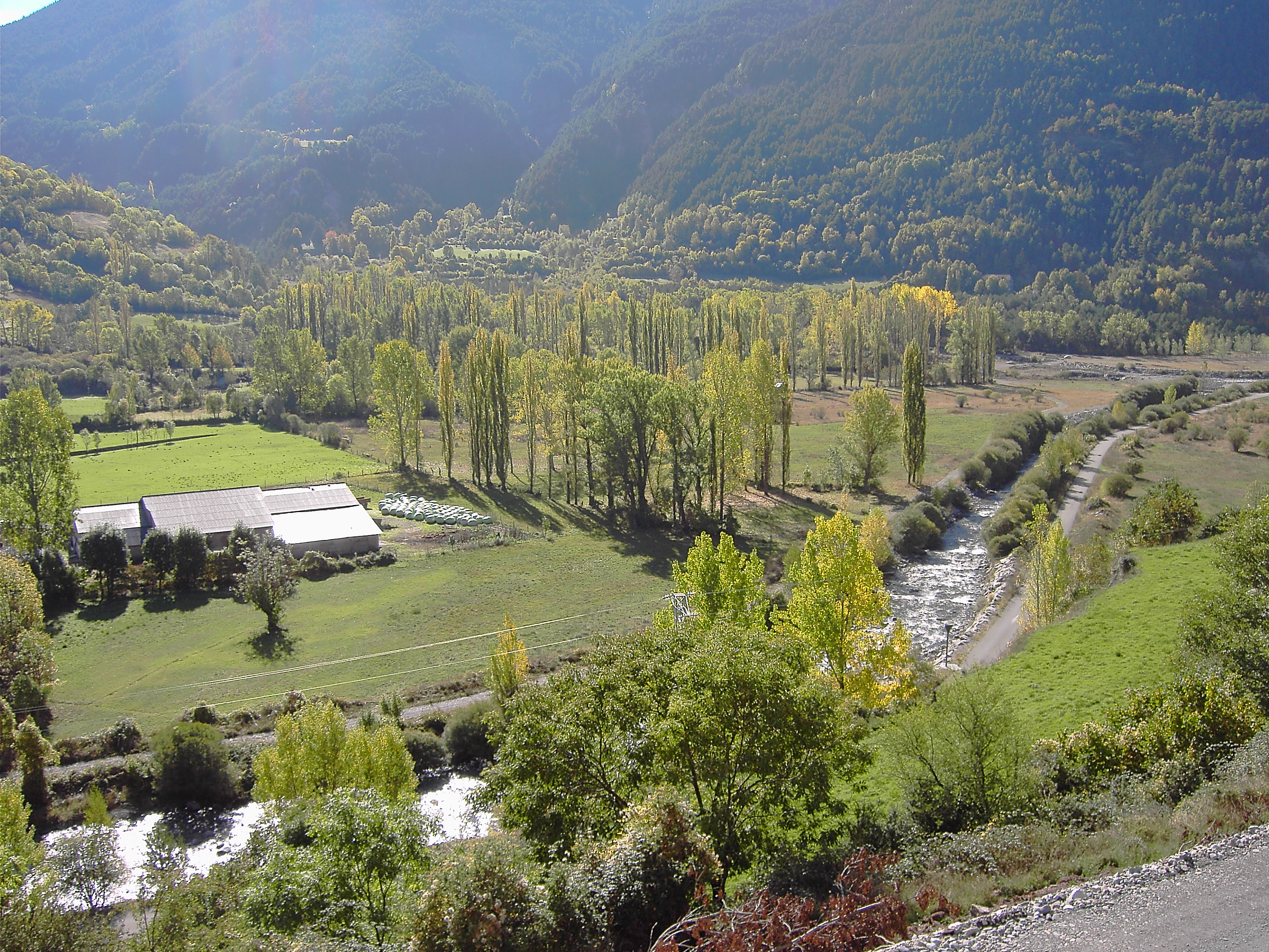 Vista del rio Cinqueta a su paso por San Juan de Plan. Los claros del bosque en el fondo corresponden al entorno de las bordas y ermita de San Mamés.